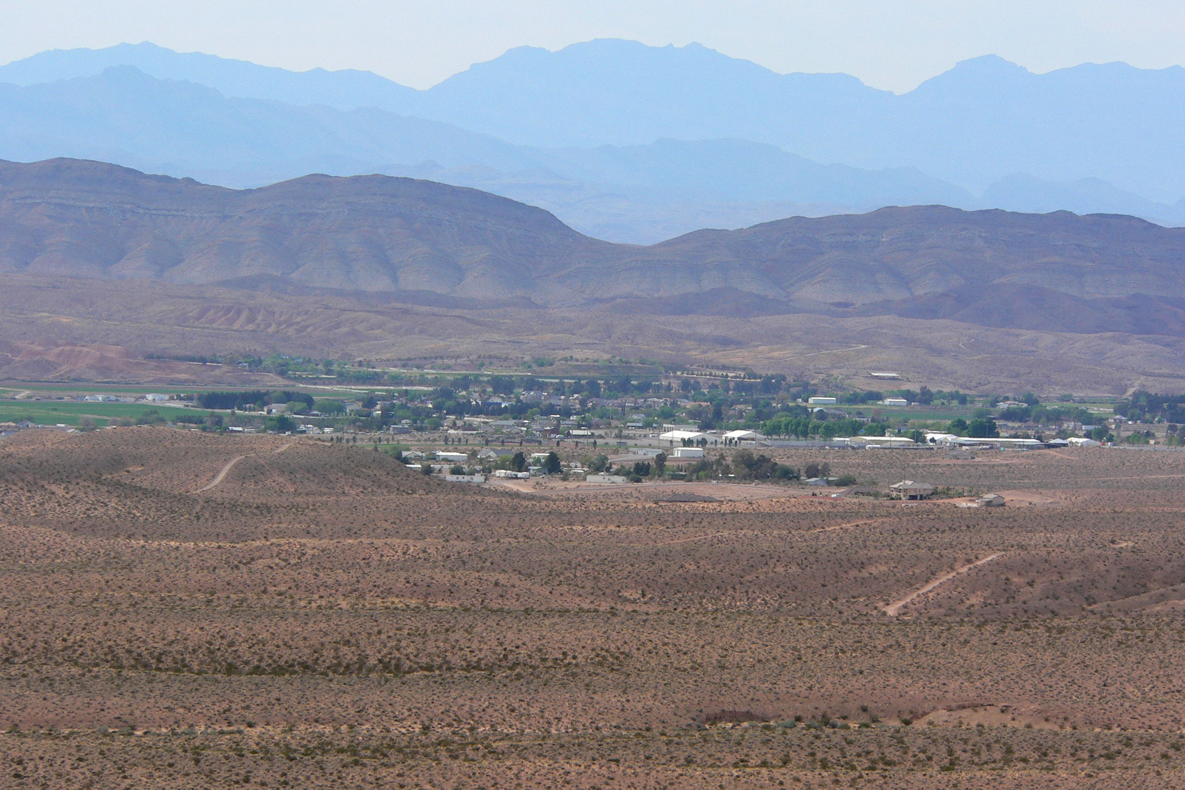 Logandale, Nevada from Mormon Mesa